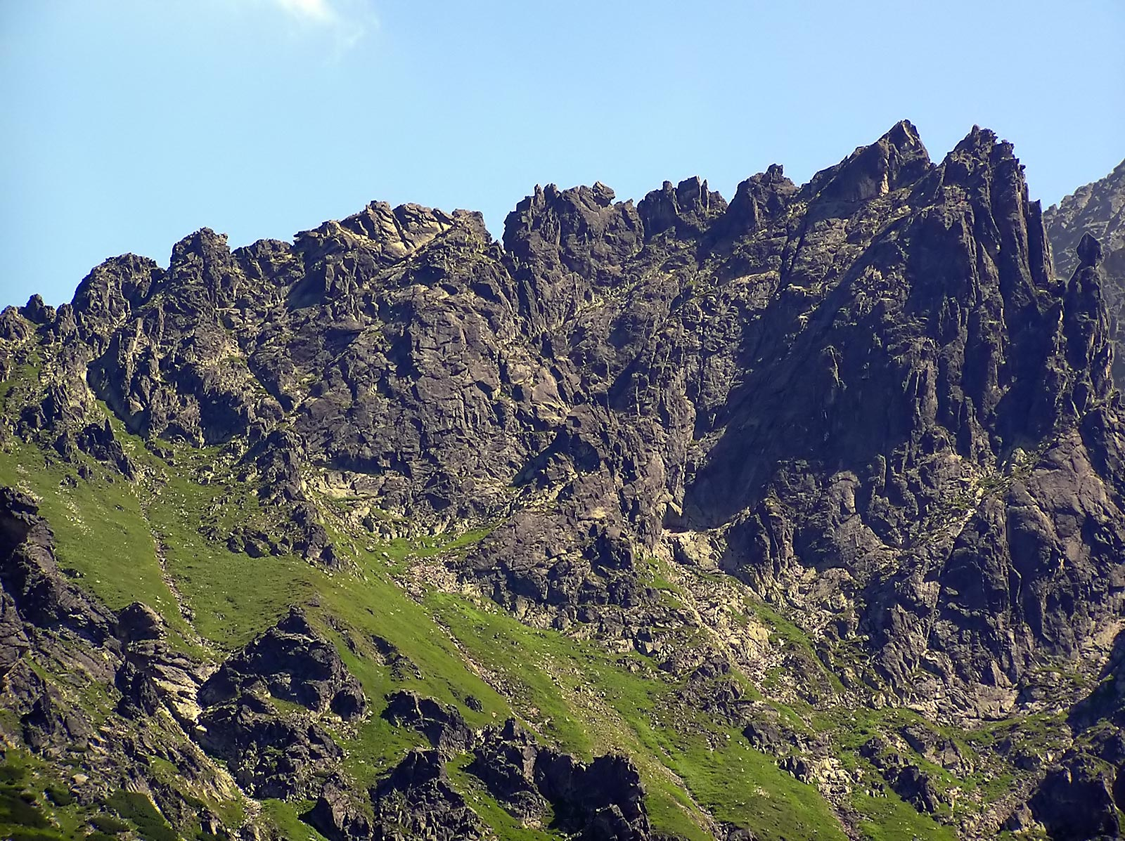 Północna grań Żabiego Mnicha. Od lewej: * Białczańska Przełęcz (już za lewą krawędzią zdjęcia) * Białczańskie Czuby * Zadnia Białczańska Baszta (Czuba nad Żabimi Wrótkami) * ostre wciecie Żabich Wrótek * Żabie Zęby * Żabi Mnich * nieco niższy Żabi Kapucyn * w prawo w dół Żabia Lalka Jestem autorem tego zdjęcia - Andrzej Makarczuk.